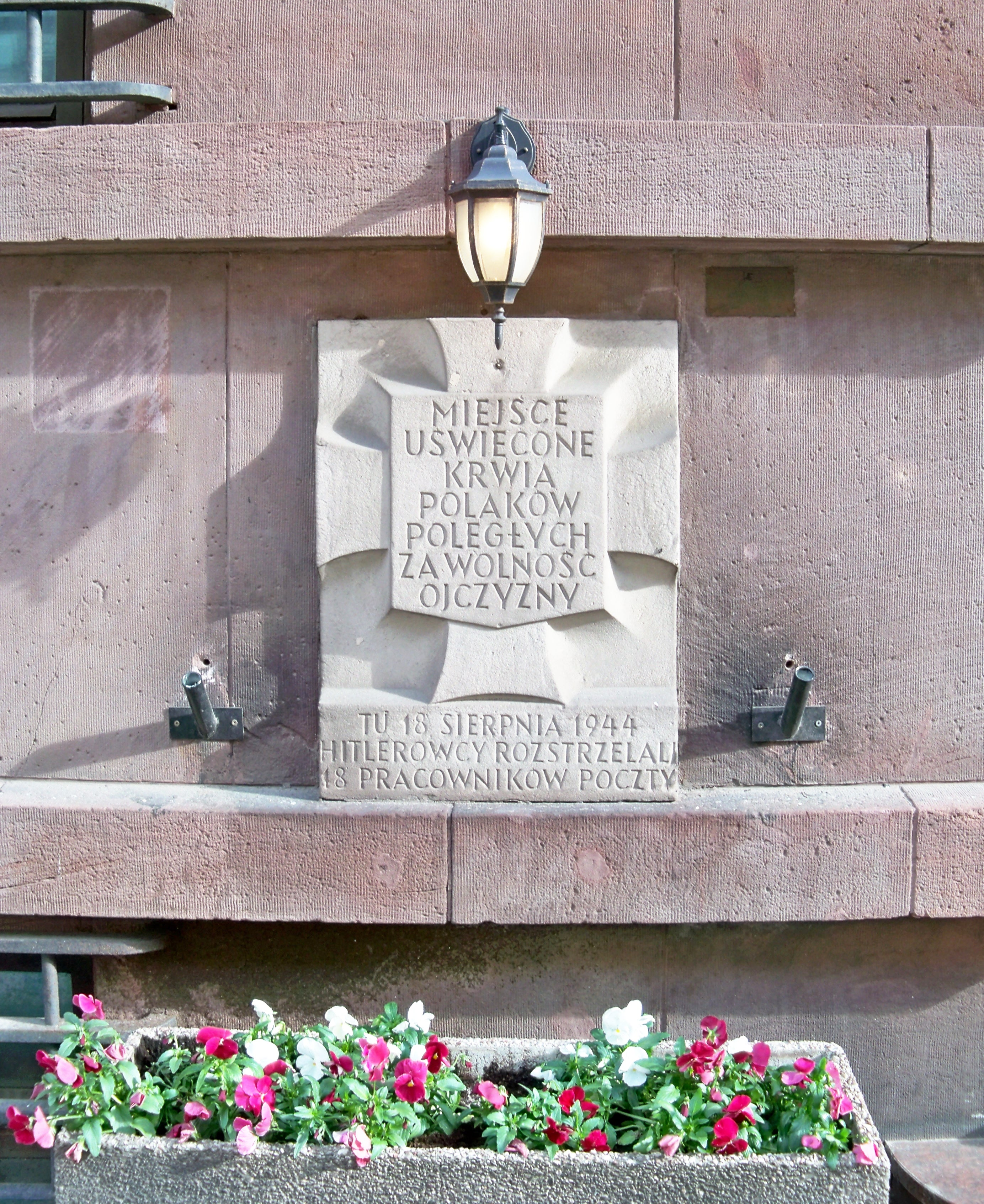 Urząd Telekomunikacyjny i Telegraficzny, ul. Nowogrodzka 45 w Warszawie)